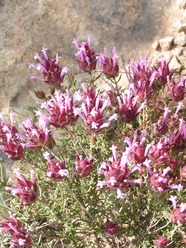 Thymus moroderi, Cantueso, Cantahueso. Detalle de los capítulos florales y las flores.